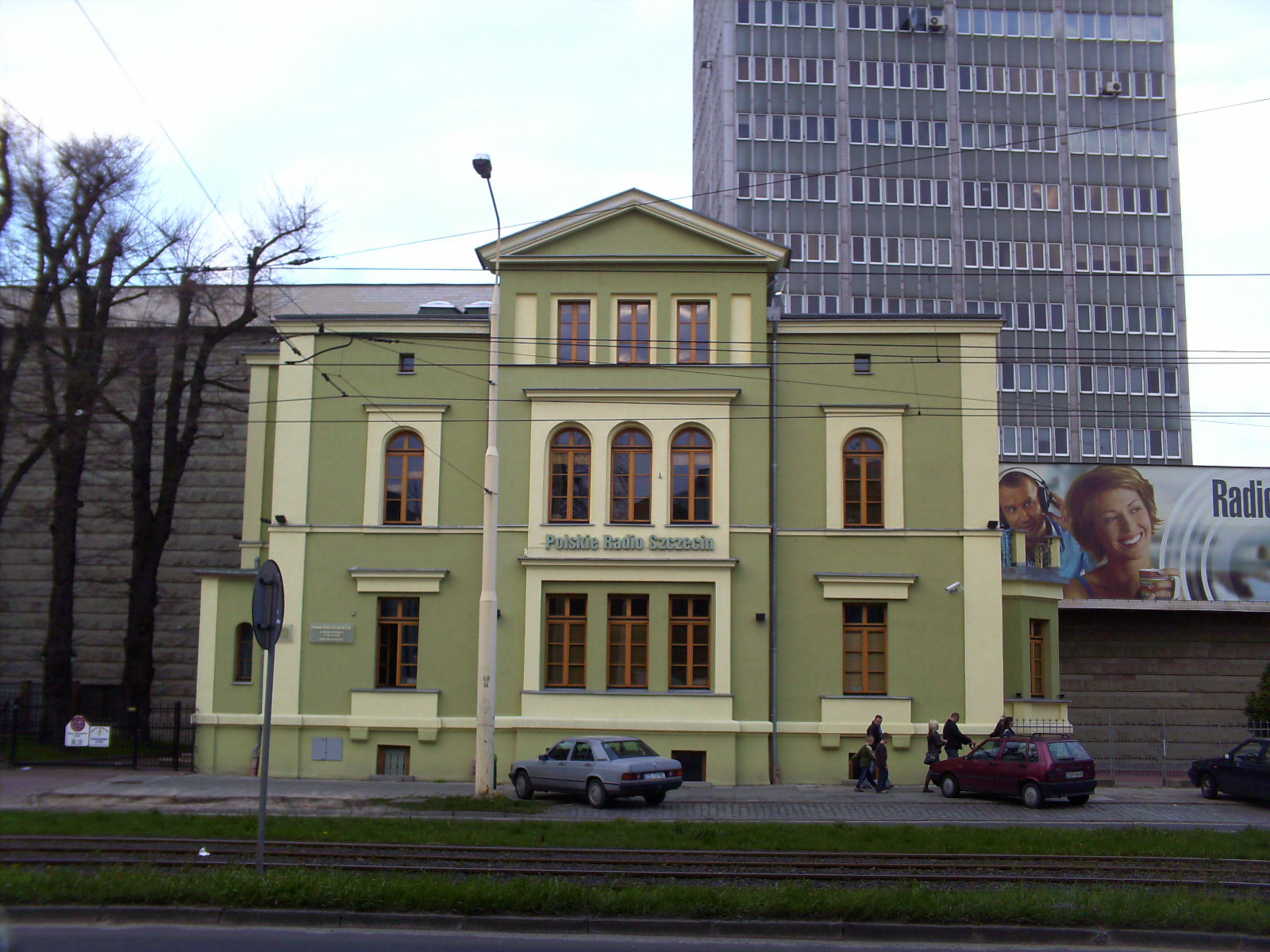 Szczecin - Willa Radia Szczecin.